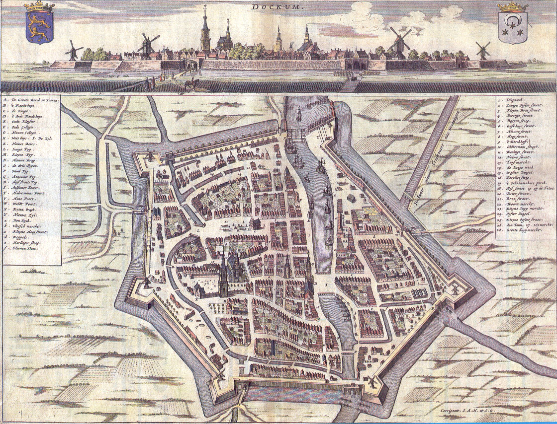 Oude kaart van Dokkum.